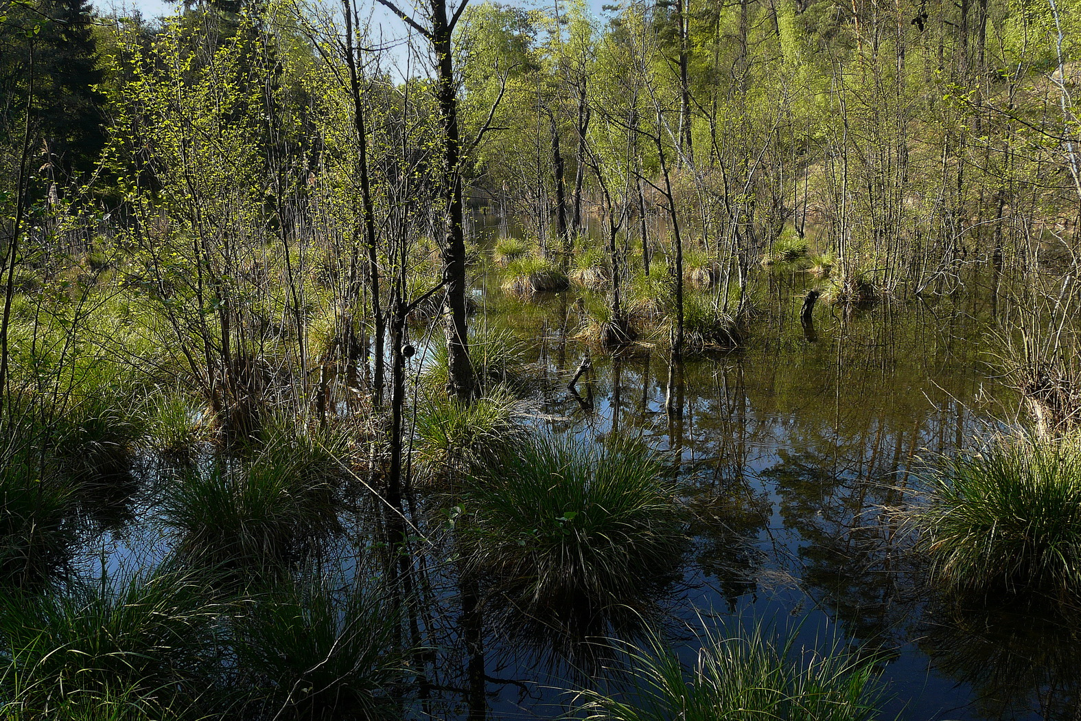 Rybníček v přírodní památce Valcha